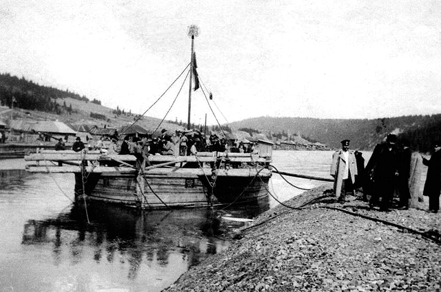 Отправка барки от Кыновской пристани (фото конца XIX в.)